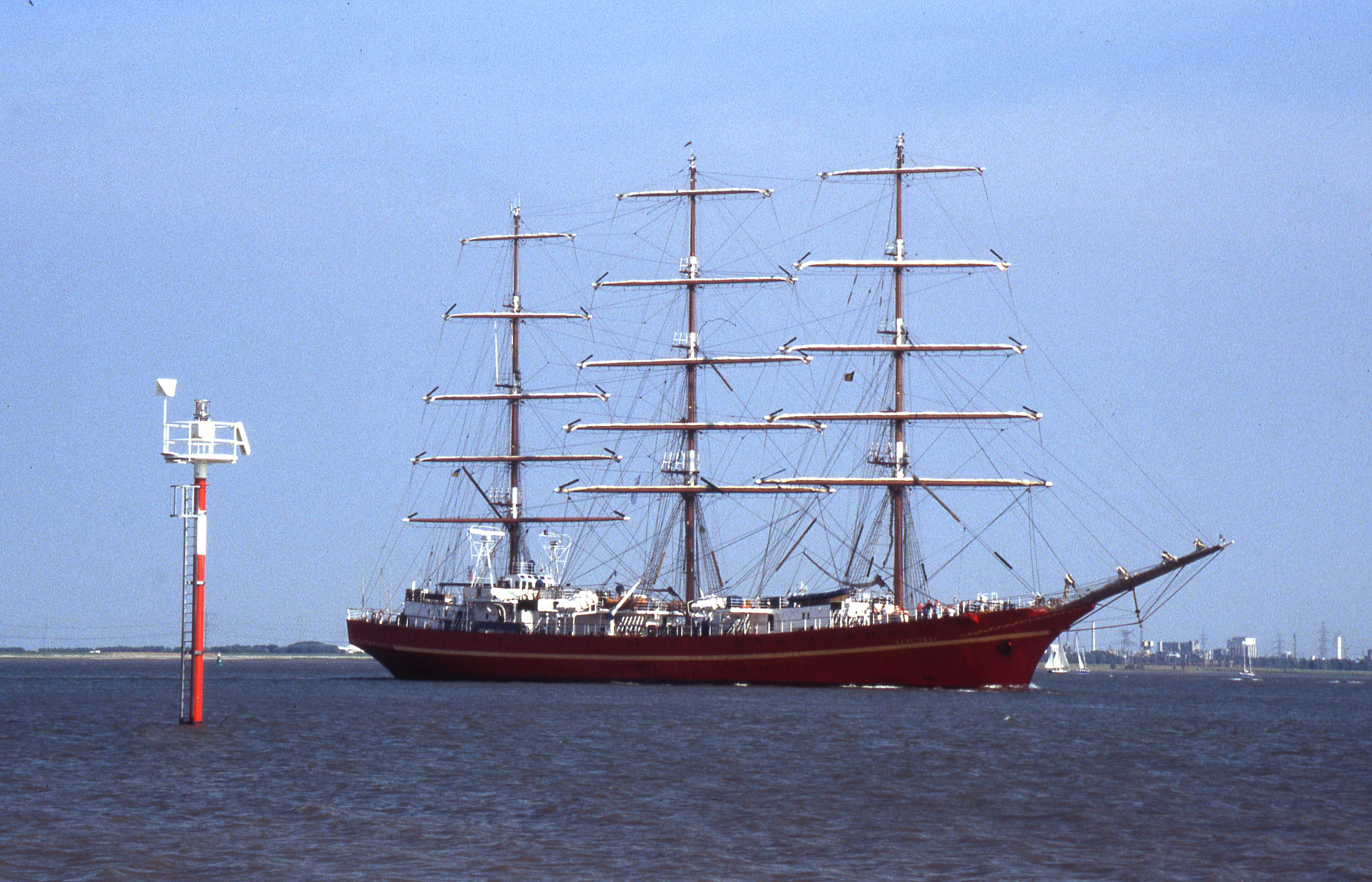 Khersones komende van Antwerpen sail gefotografeerd in het Nauw van Bath.